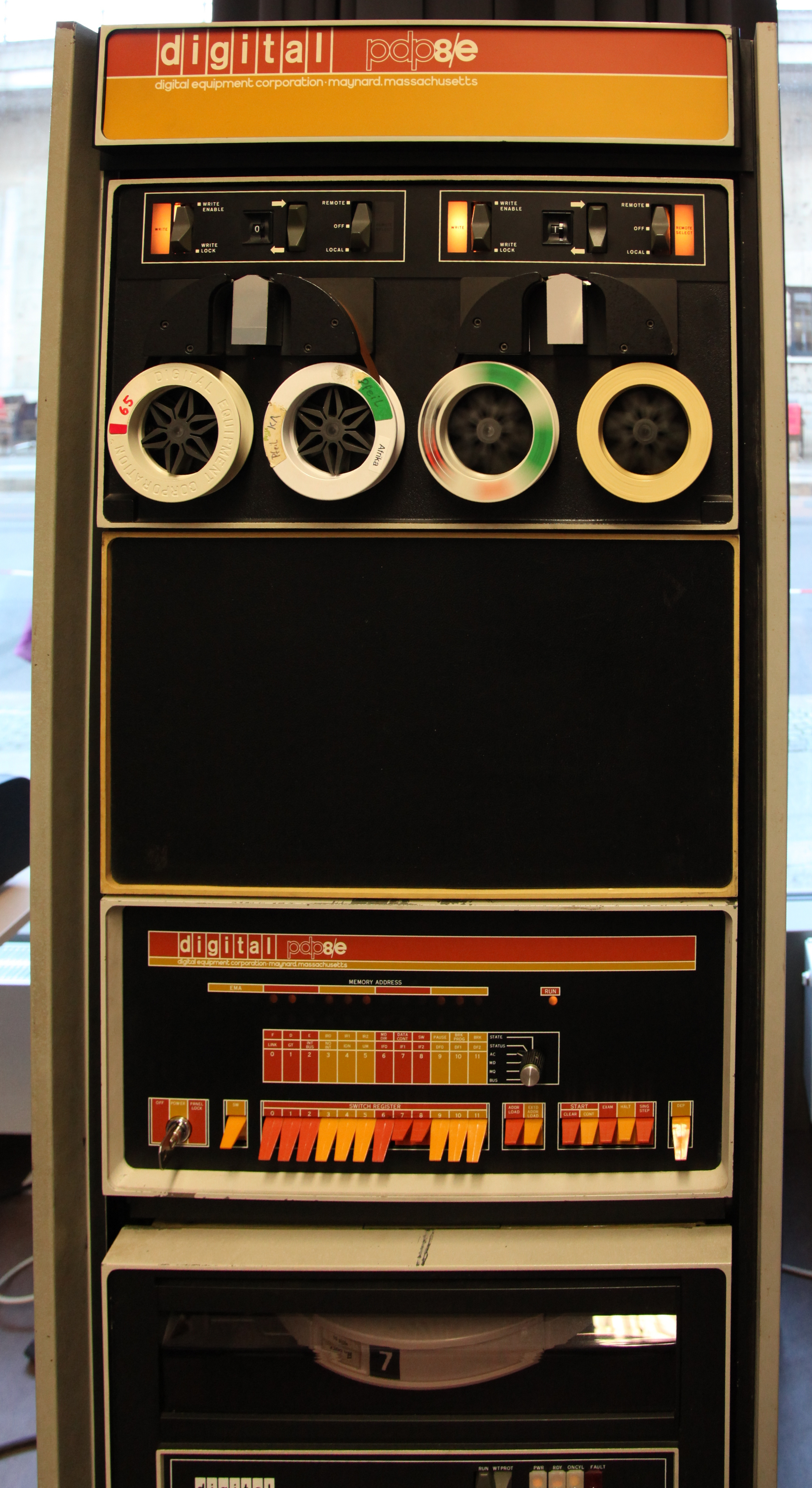 Digital PDP8/e